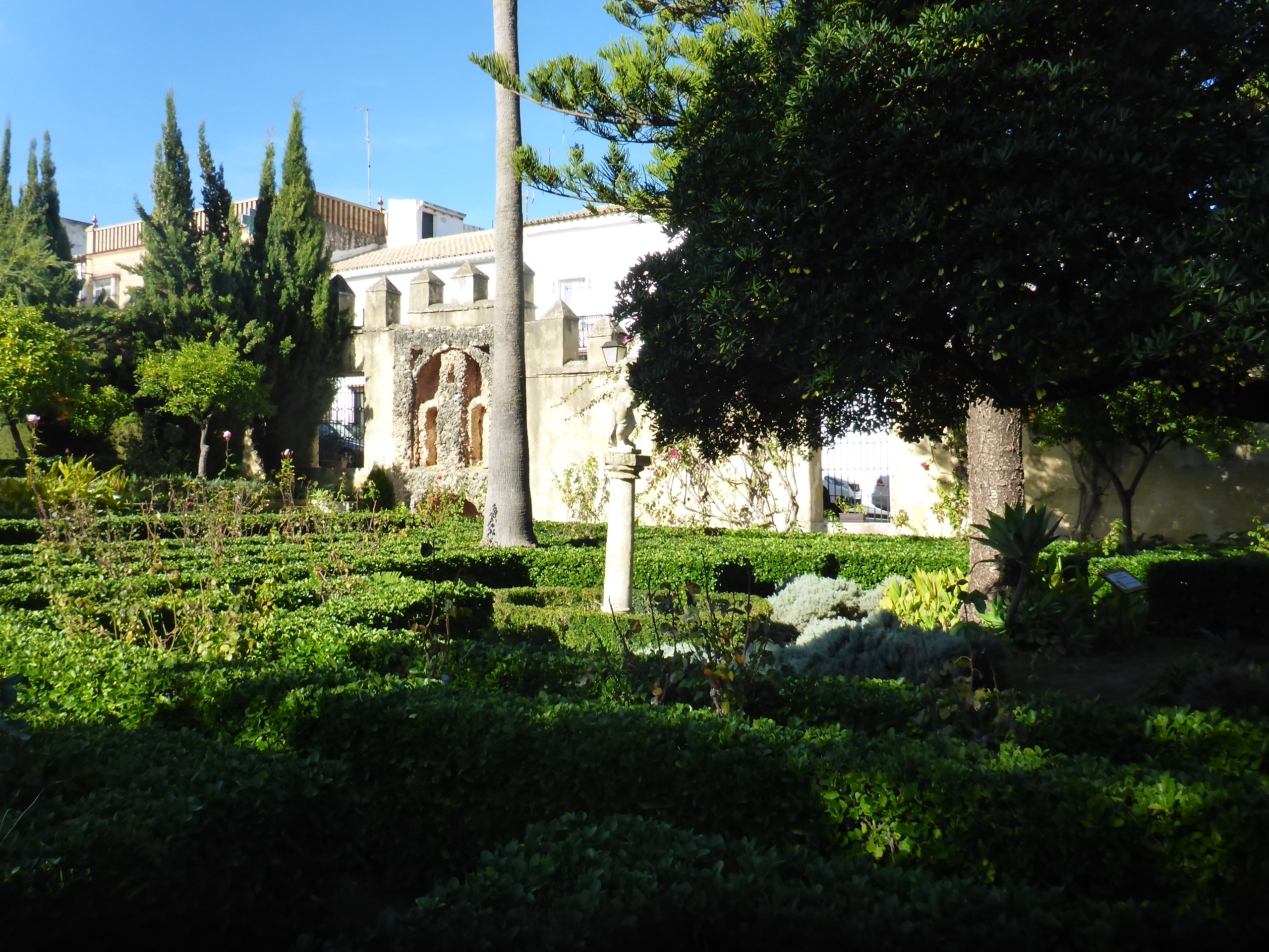 Jardines del Palacio de los Enríquez de Ribera en Bornos (Andalucía, España)